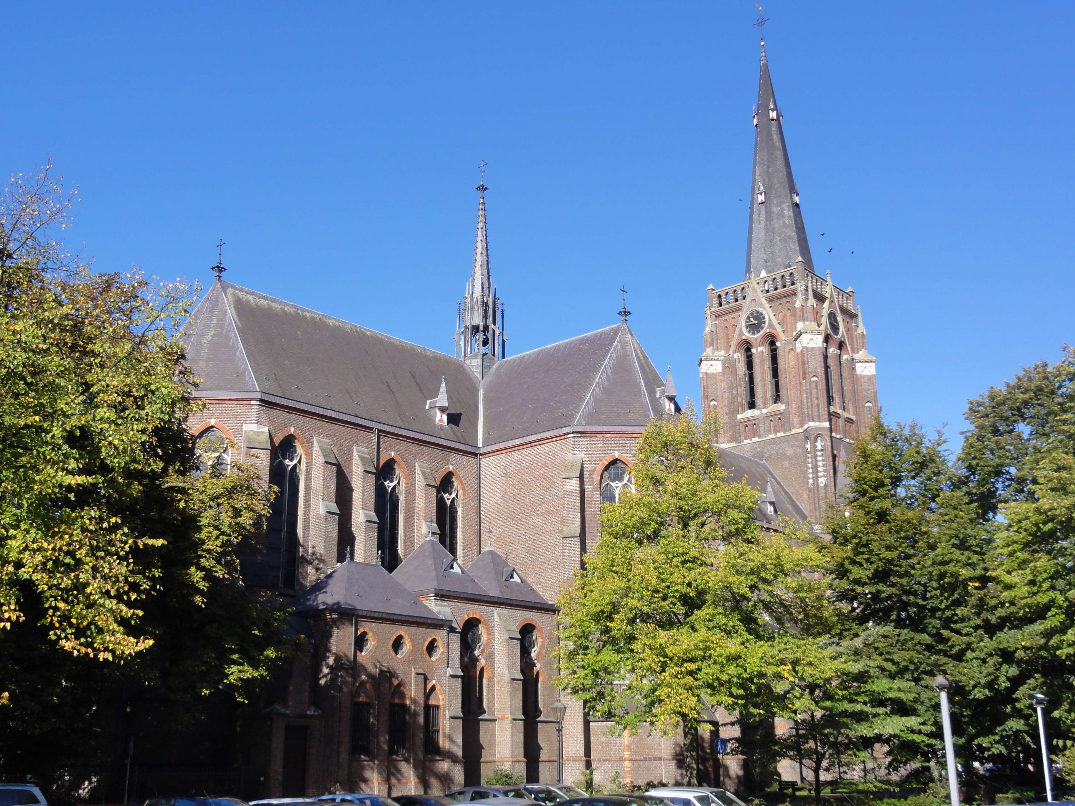 Best Rijksmonument 512321 kerk H.Odulphus 04″ N, 5° 17′ 38.28″ E